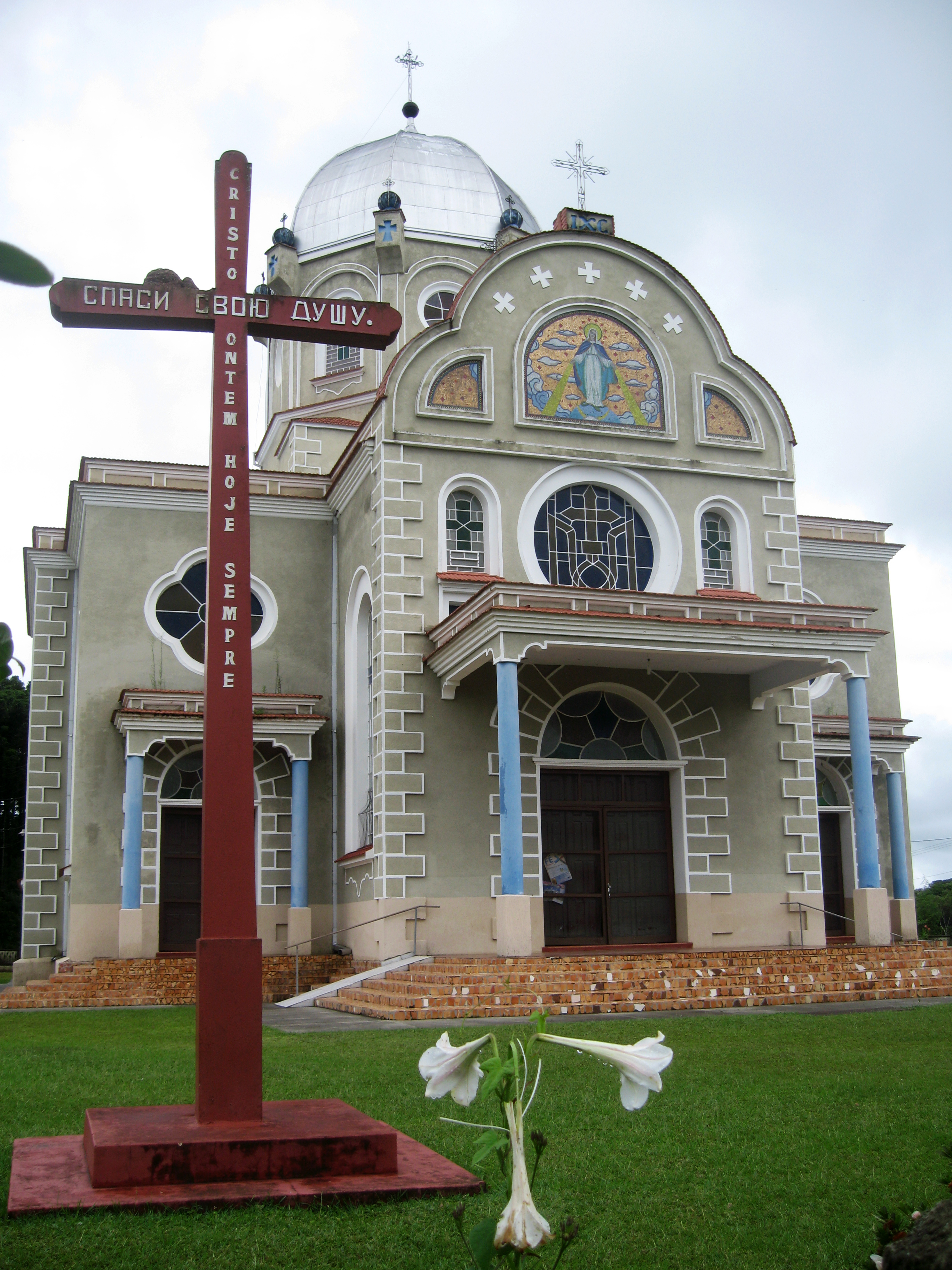 Igreja localizada em Prudentópolis - PR